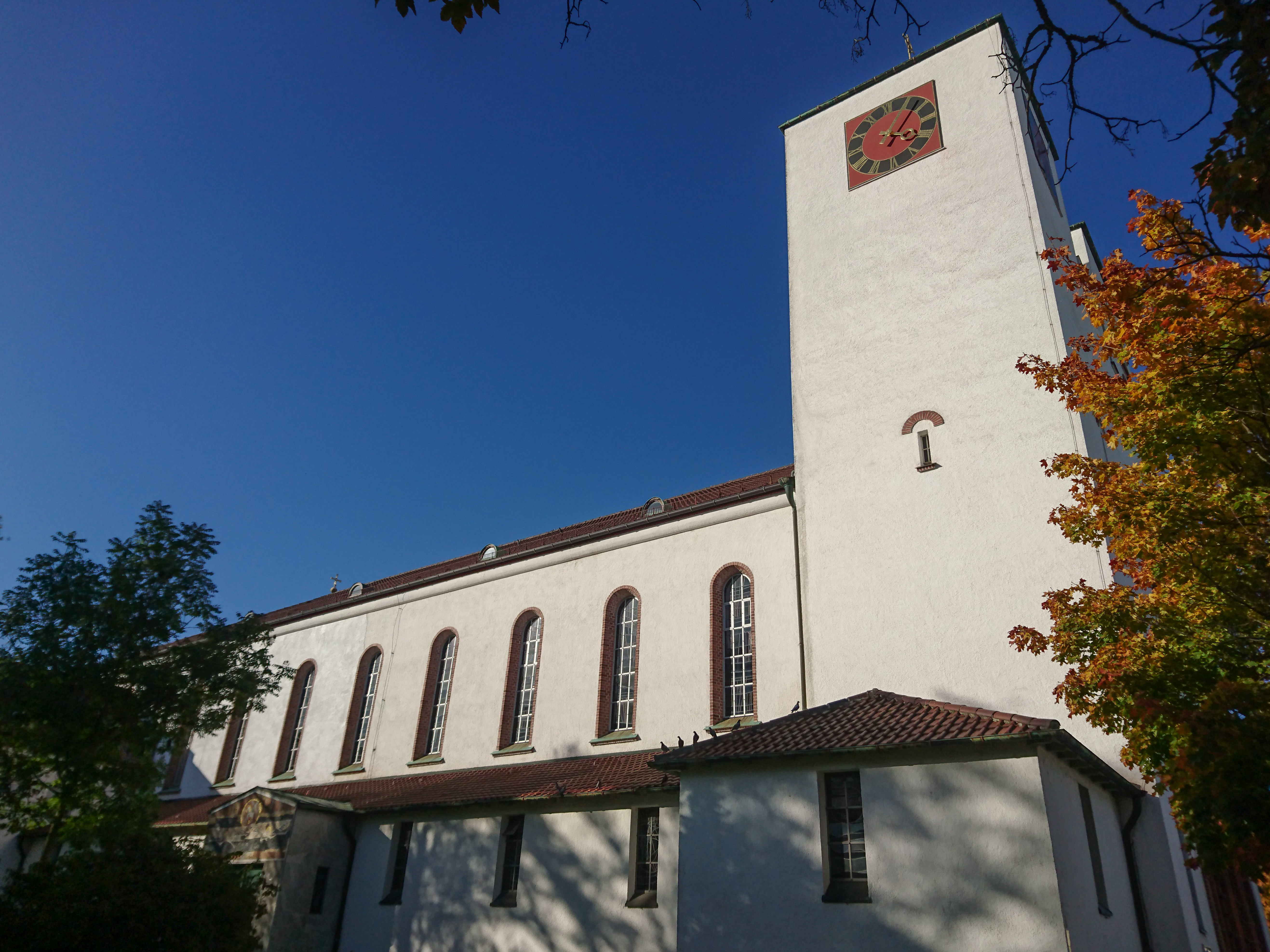 Südfassade von St. Martin in Augsburg-Oberhausen